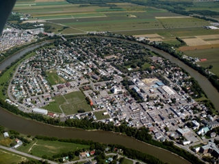 Photo aérienne du méandre de la rivière L'Assomption à L'Assomption dans Lanaudière au Québec